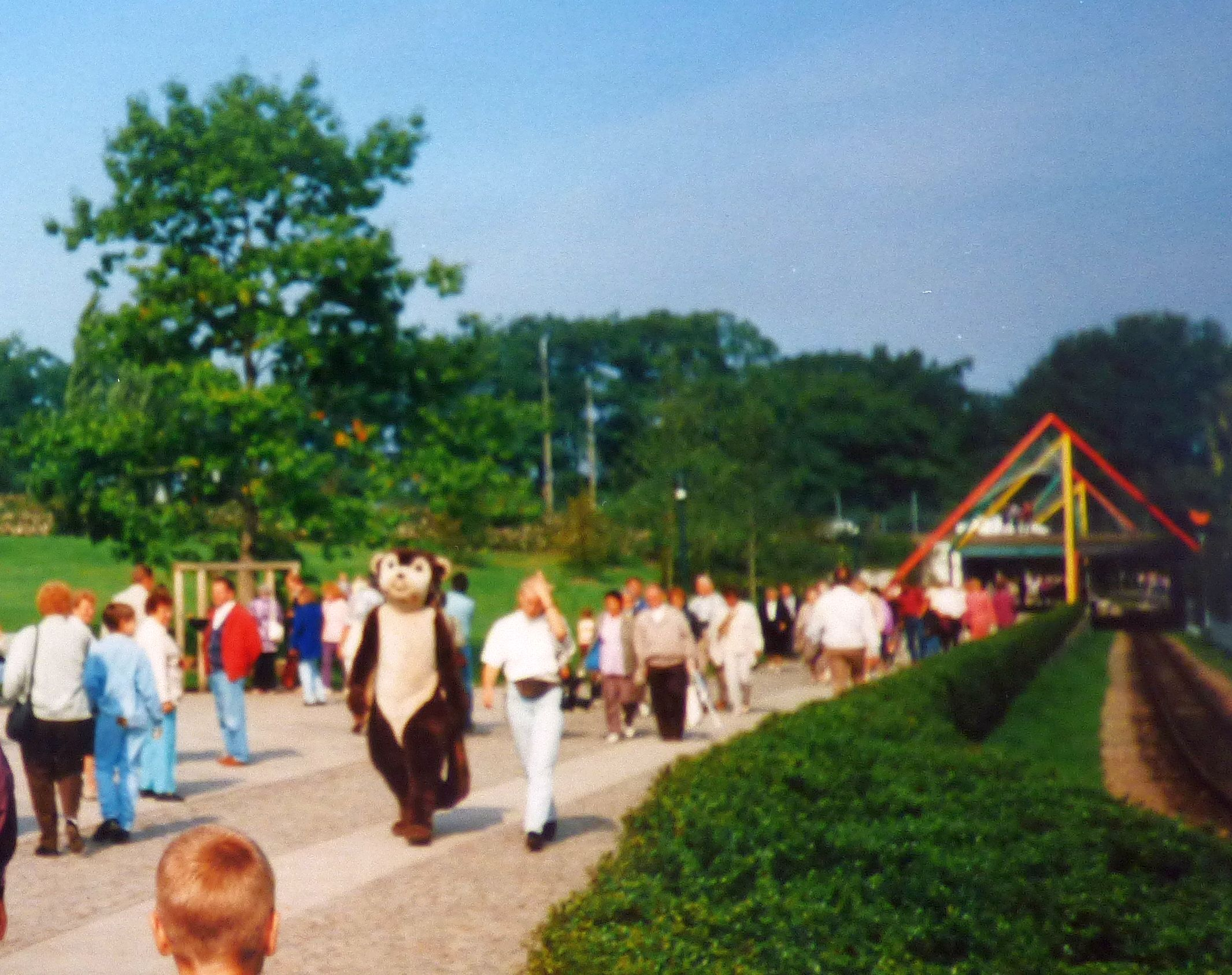 Bundesgartenschau 1995